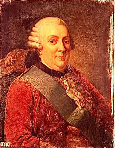 Commandé par Louis-Philippe pour le musée historique de Versailles en 1835